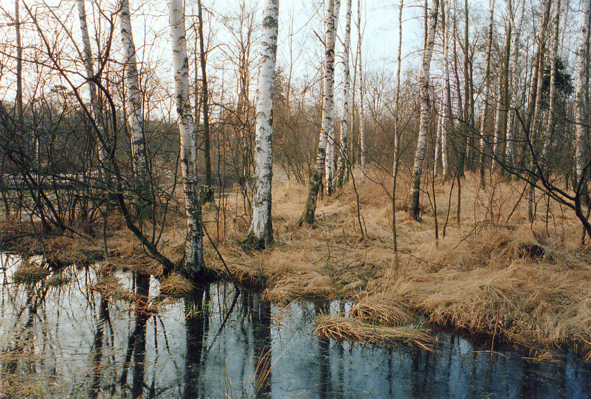 Birkenbruch im Kleinen Giebelmoor, Landkreis Gifhorn, Niedersachsen